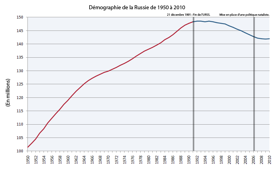 Démographie de la Russie.